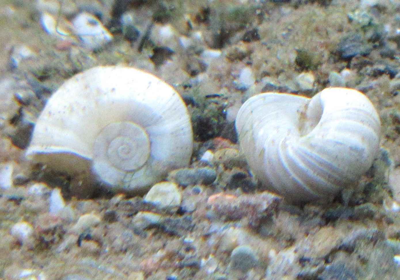 leere Mäntel zweier Posthornschnecken nach Farbverlust